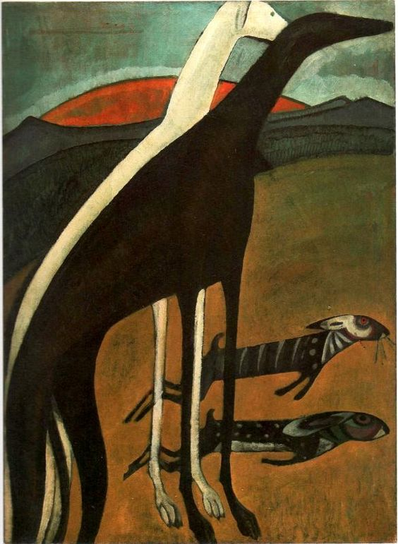 Die WindhundeOs galgostitle QS:P1476,de:"Die Windhunde" label QS:Lde,"Die Windhunde"